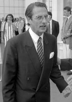 27.7.1989 Der neue Chef des Bundespräsidenten-Amtes, Staatssekretär Dr. Andreas Meyer-Landrut, gibt einen Abschiedsempfang für seinen Amtsvorgänger Klaus Blech, der als Botschafter nach Moskau geht, im Bahnhof Rolandseck.